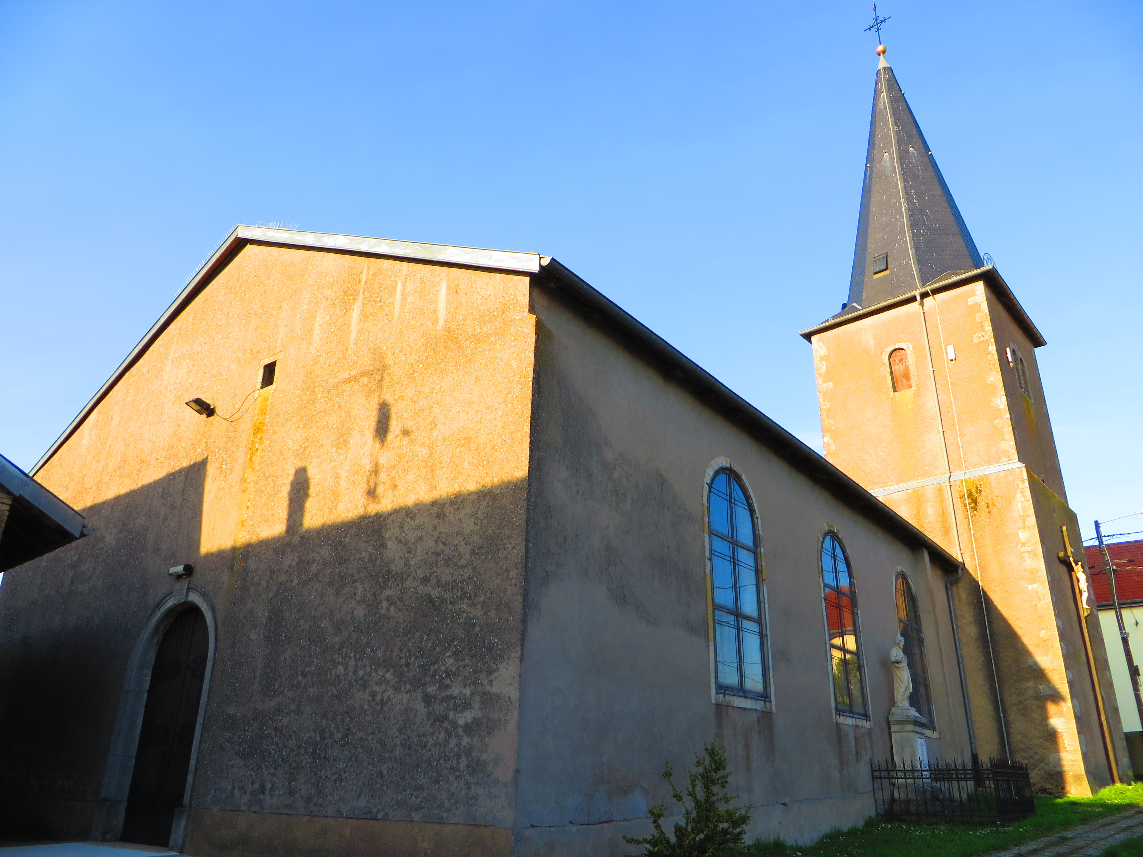 Haboudange Église Saint-Laurent